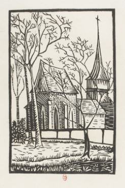 Église d'Offoy en hiver durant la guerre de 1914-1918, par Gaspard Maillol in Petites églises de la guerre / album de bois dessinés et gravés aux armées par le brigadier Gaspard Maillol BNF/gallica